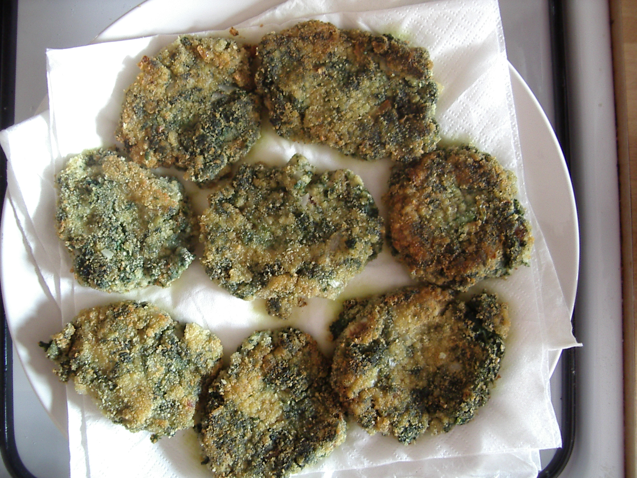 Nettle and millet fritters